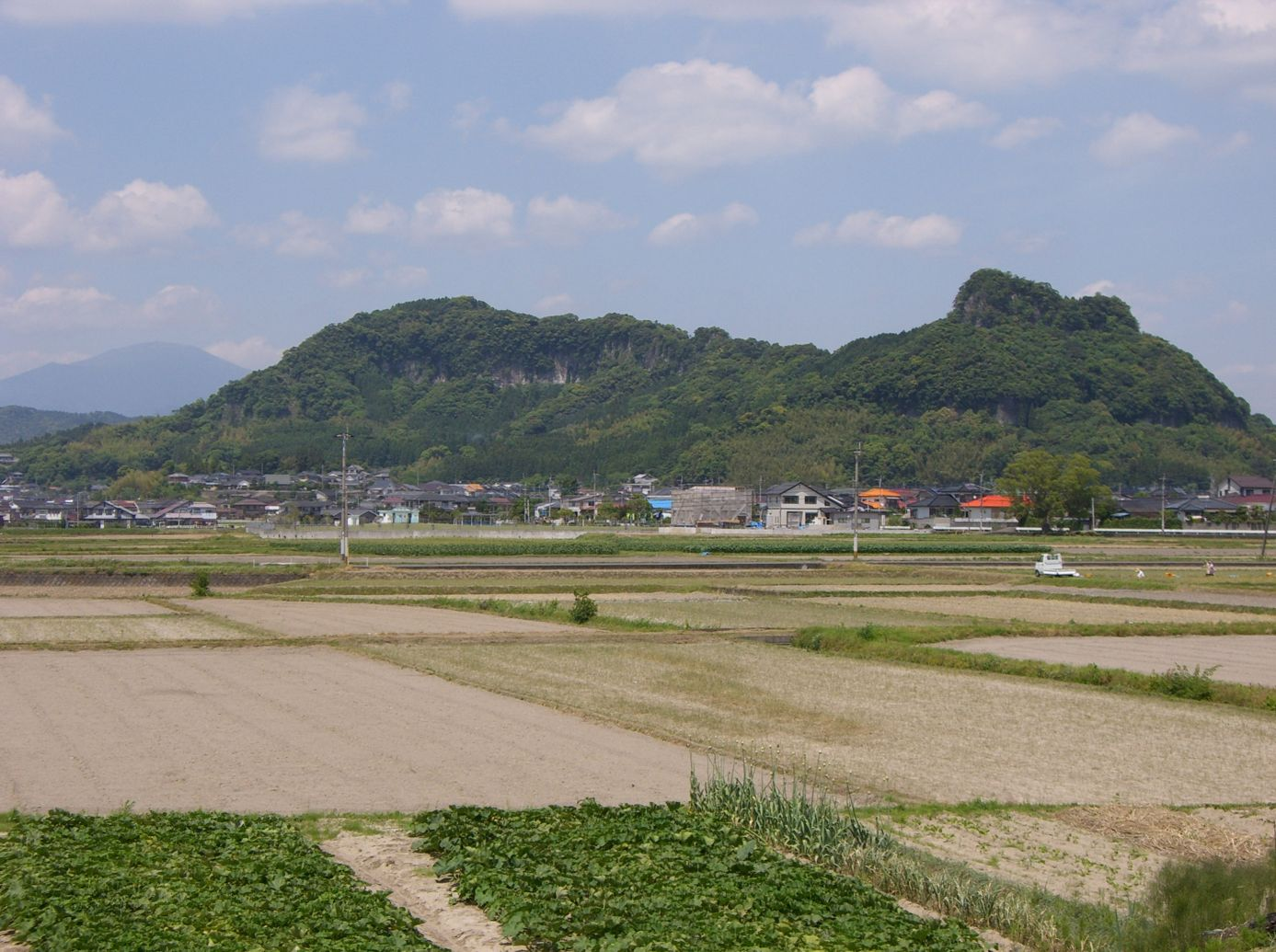 Himeki castle in Kirishima City, Kagoshima, Japan.(鹿児島県の姫木城跡。南西方向より撮影。)